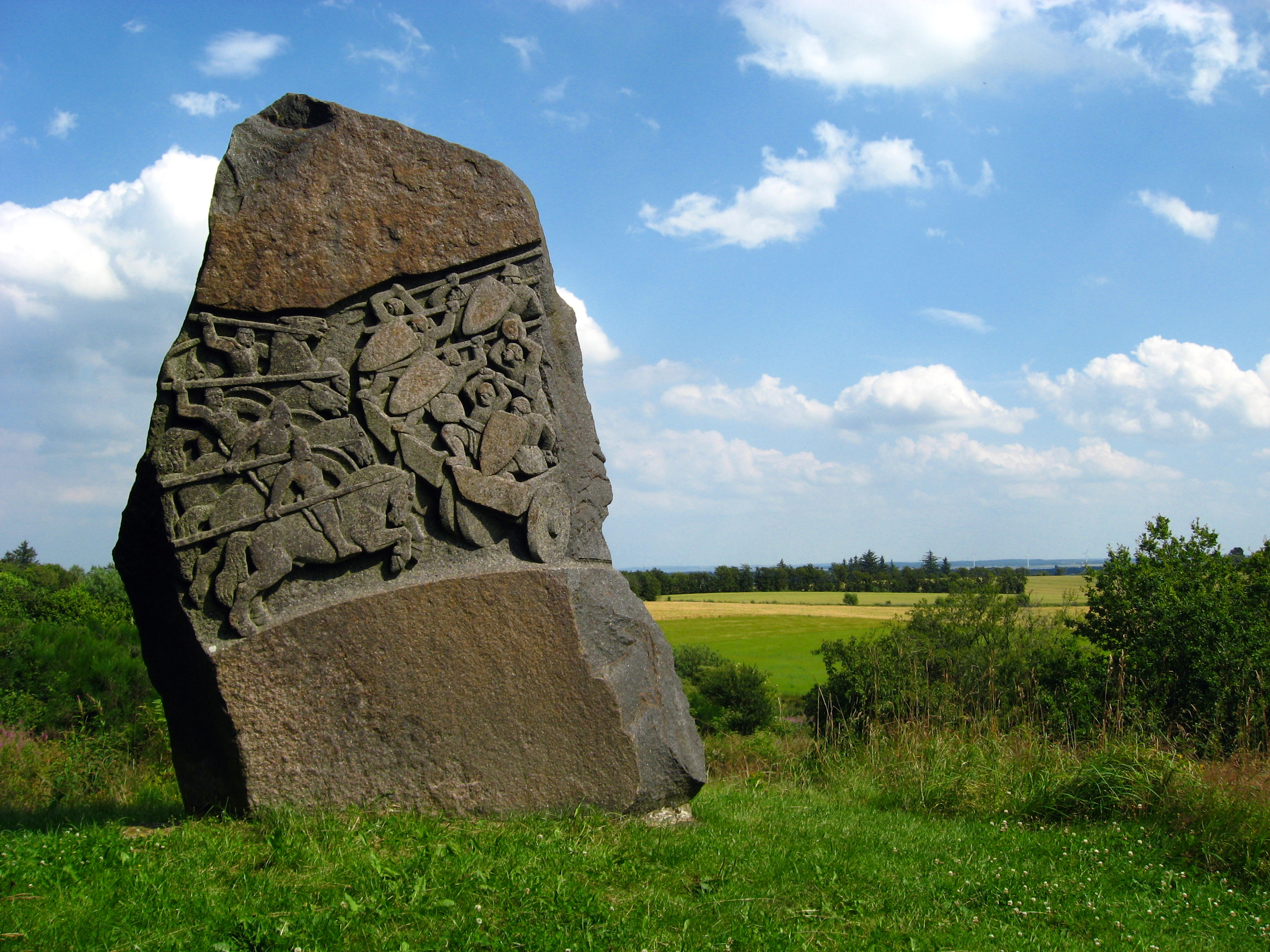 Husby Hole. Mindestenen for bondeoprøret i 1441